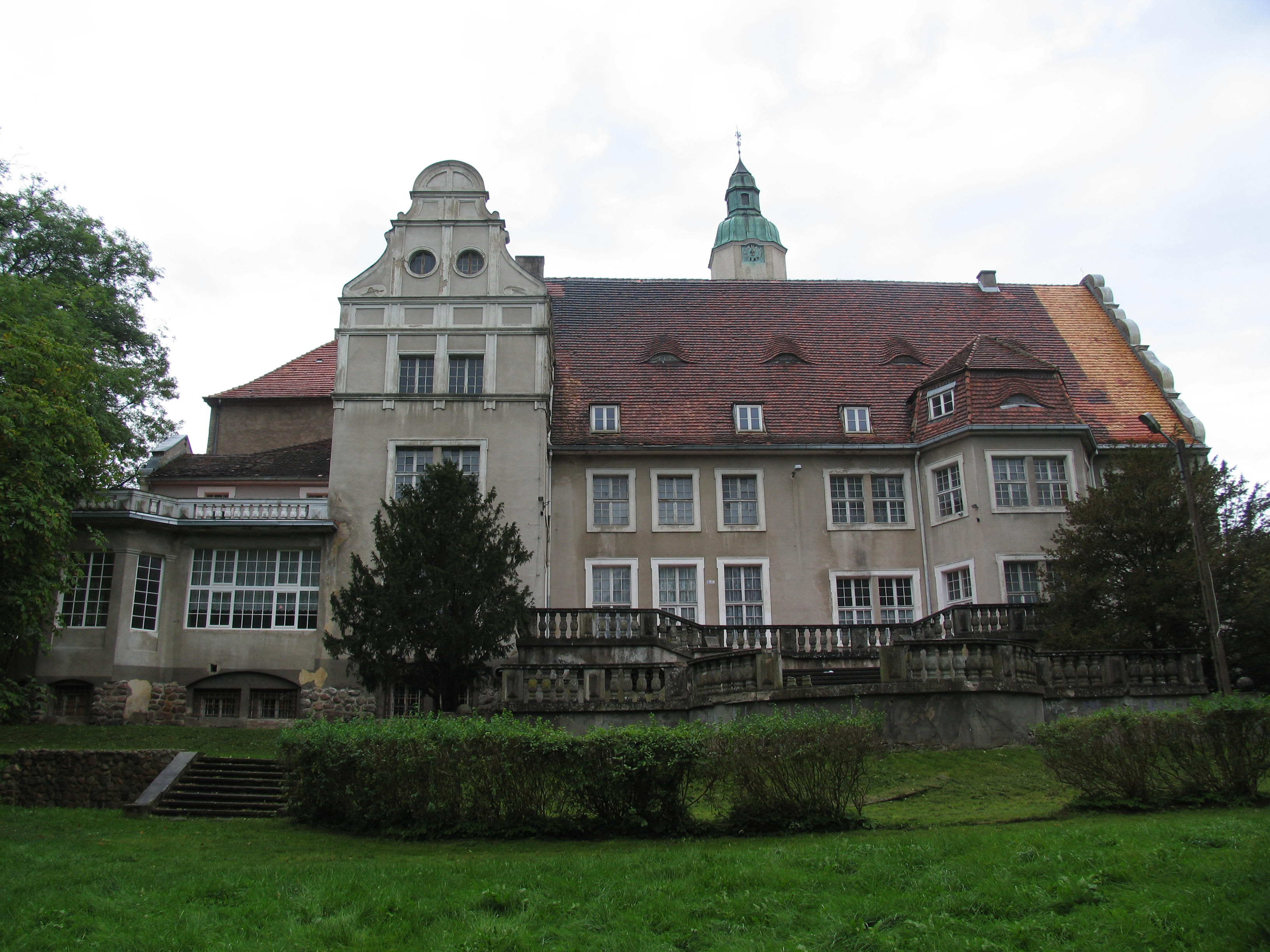 Płoty, zamek, tzw. nowy, 1606-1618, 1910-1912